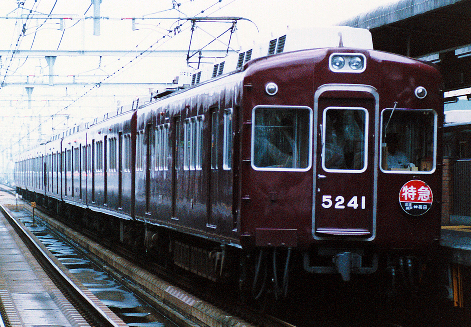 阪急 5200系電車 特急 5241